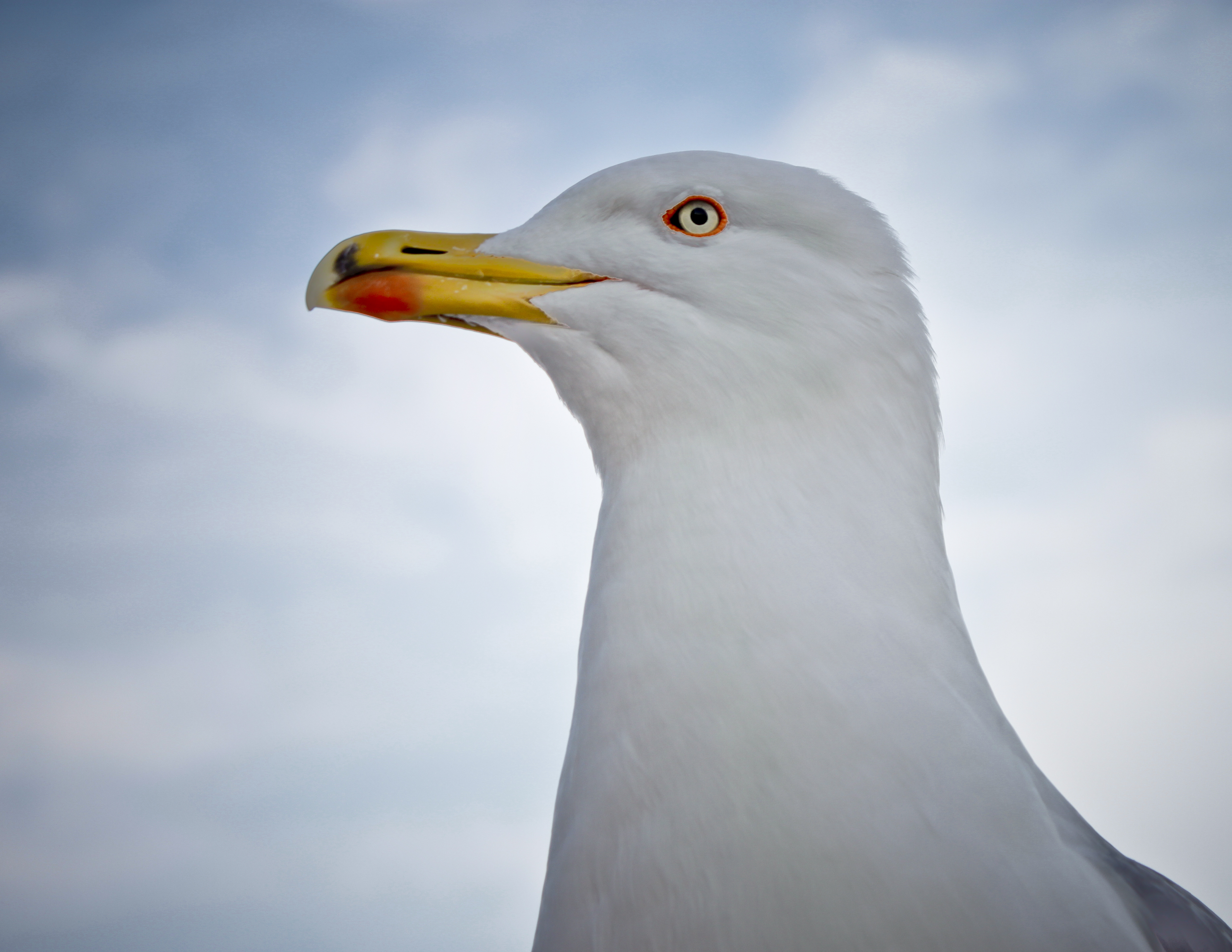 Larus michahellis. Fotografia di Gabriele Altimari